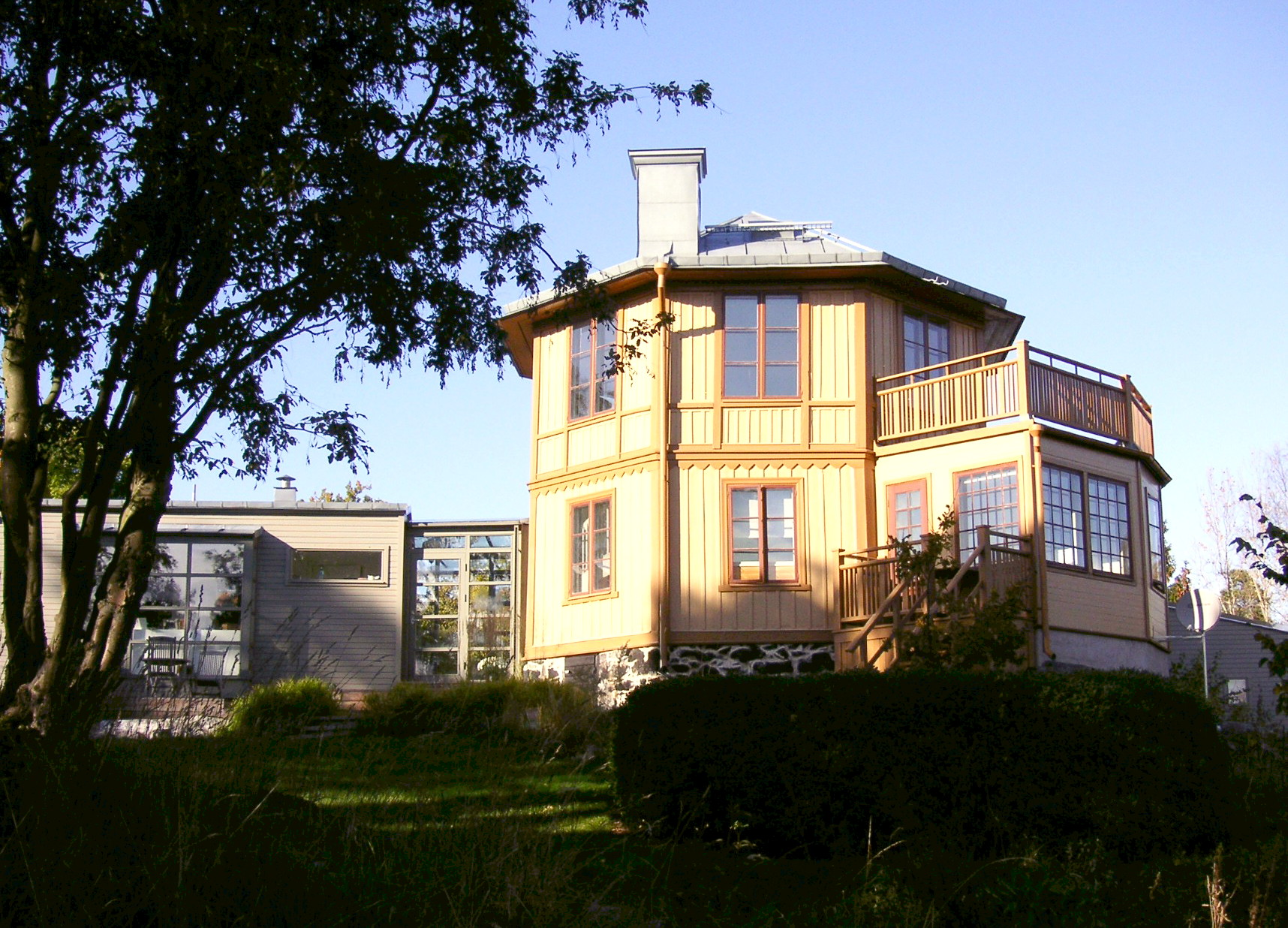 "Villa Fridhem" på Gärdet i Stockholm